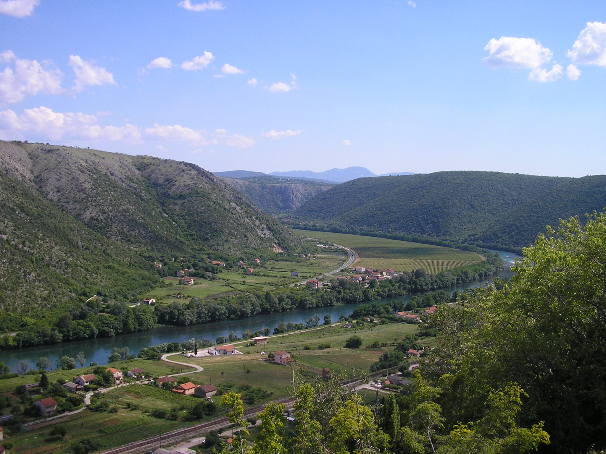 Žitomislići